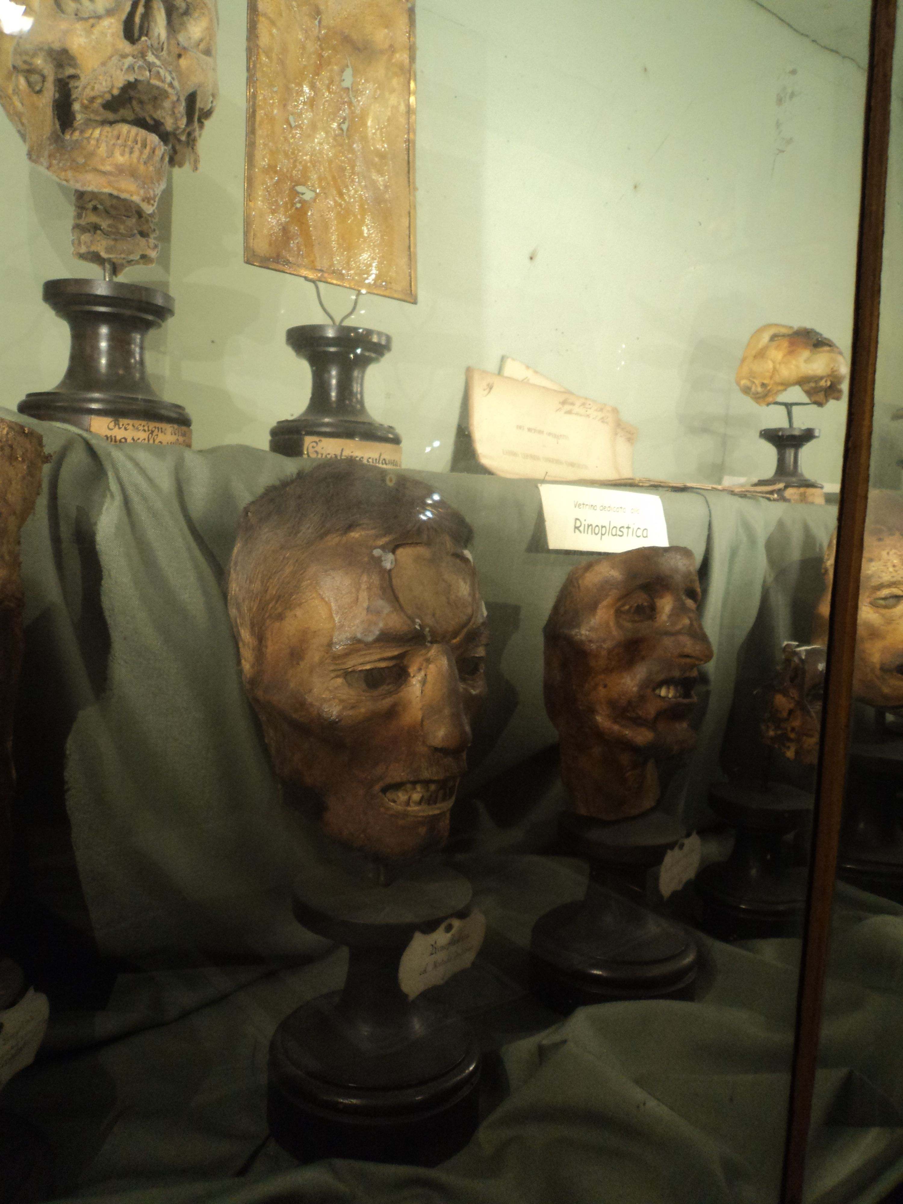 Reperti di rinoplastica con metodo indiano conservati al museo per la storia dell'Università di Pavia